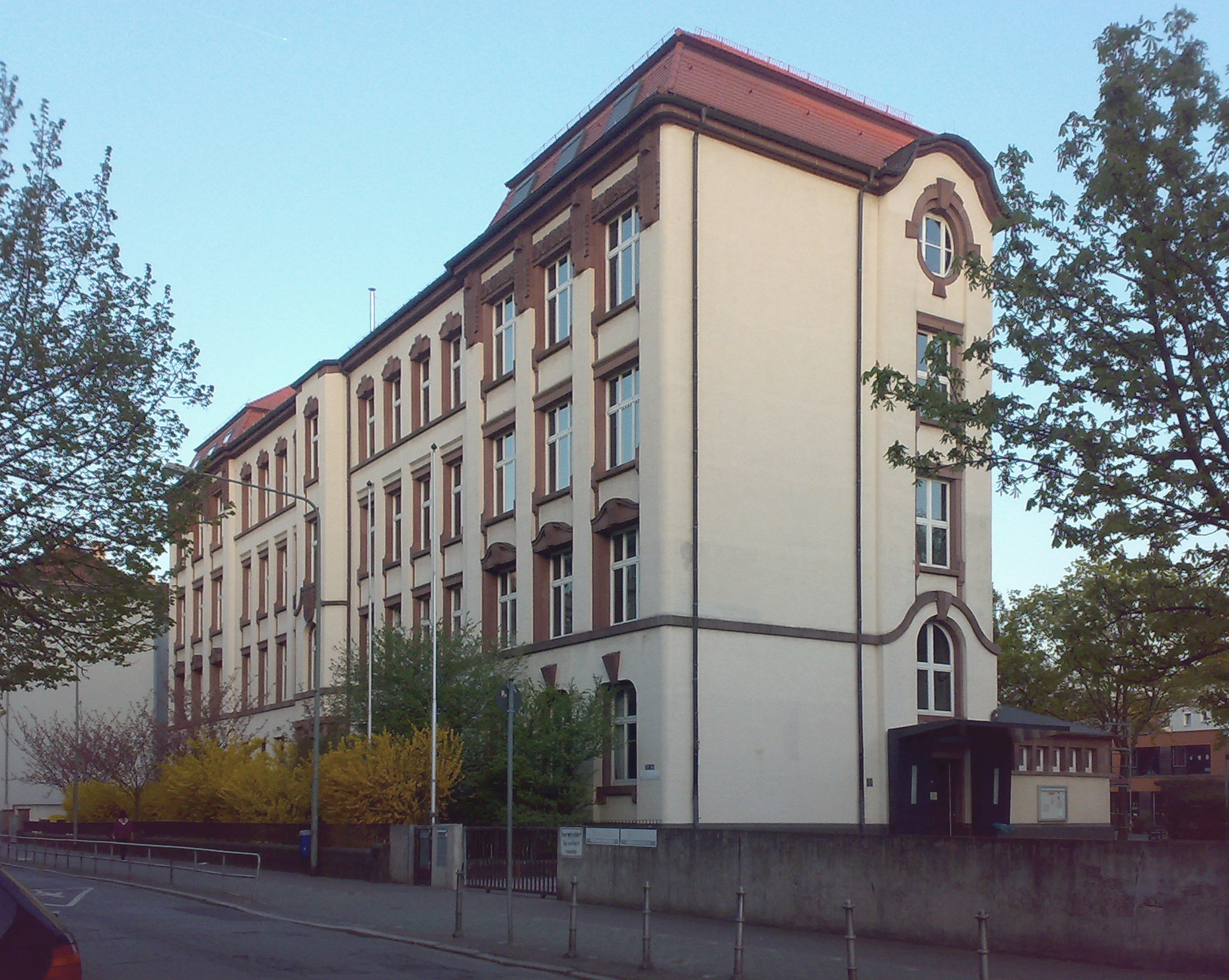 Deutschherrenschule Frankfurt am Main